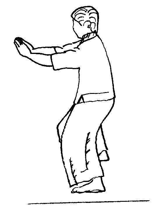 aile3.jpg